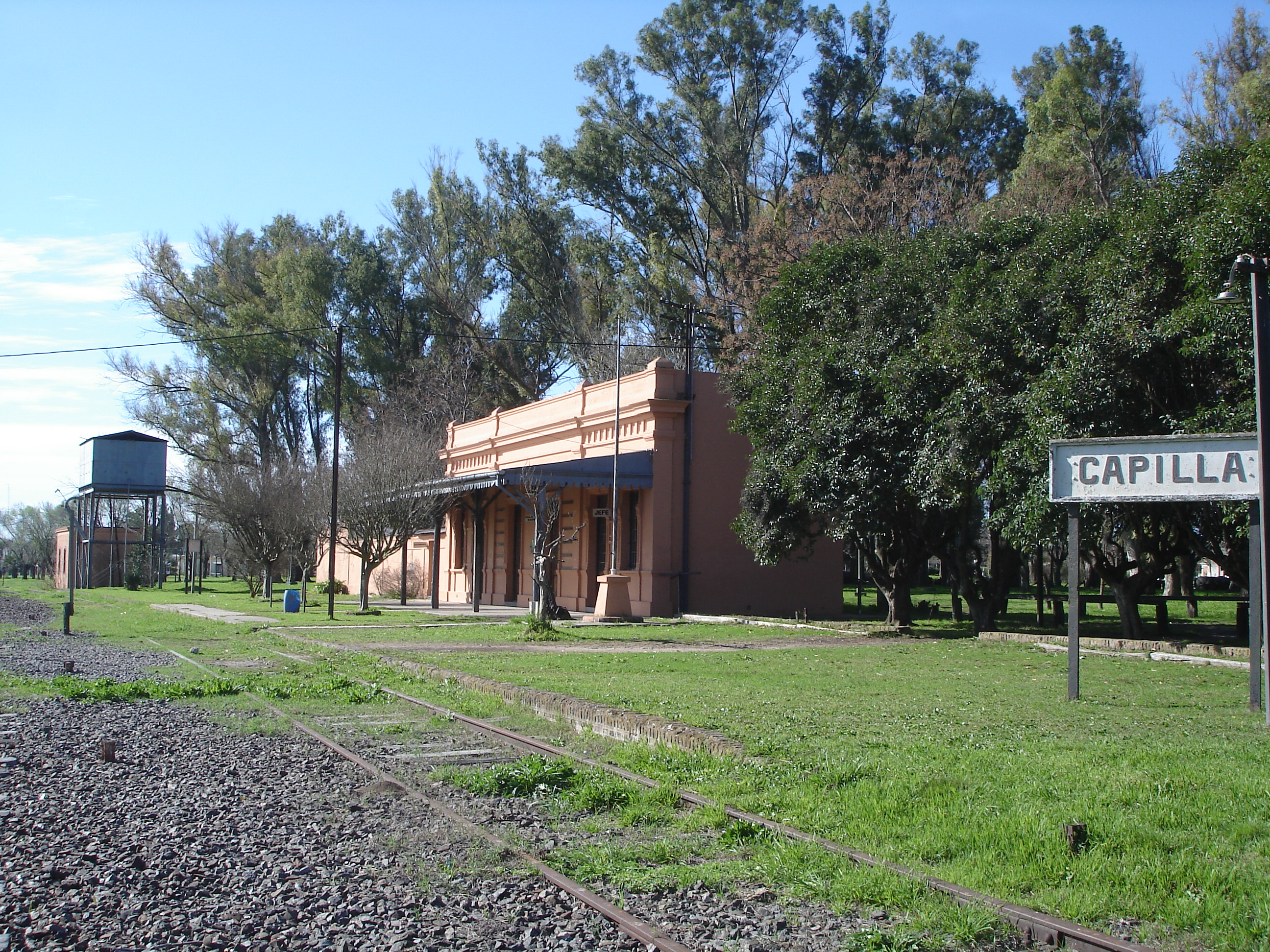 Pueblo de Capilla del Señor